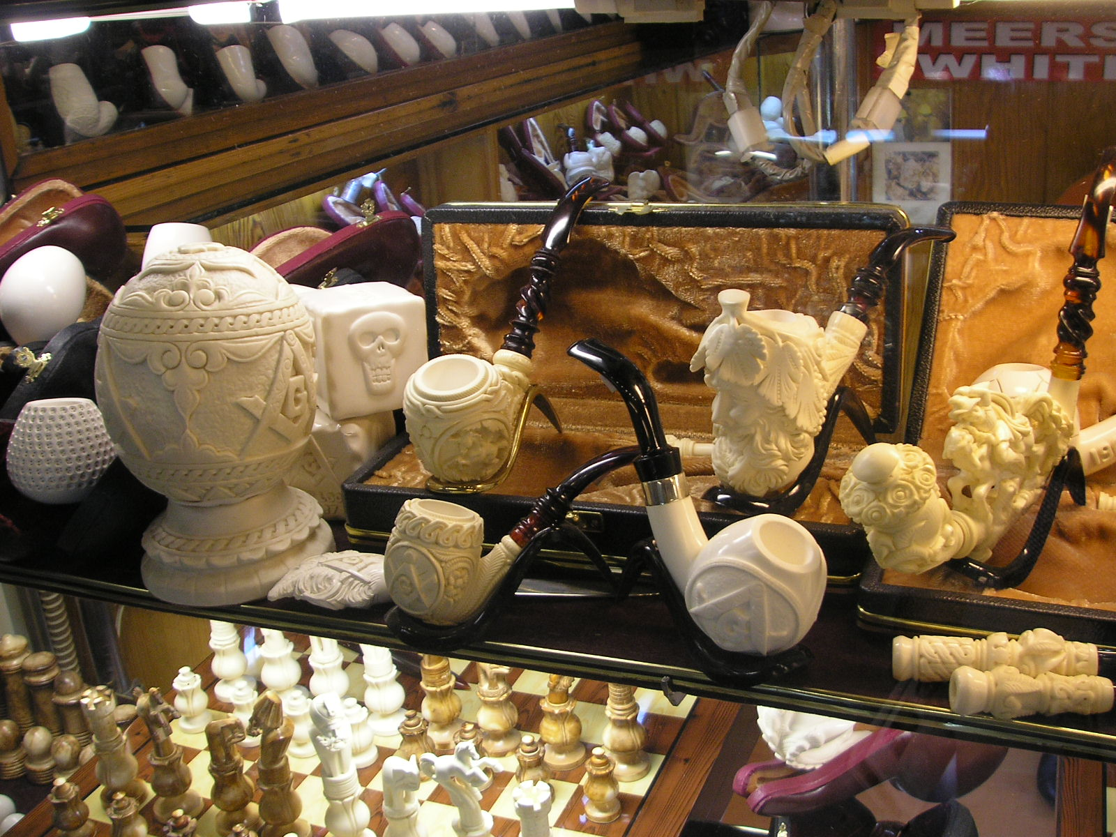 Meerschaum pipes in the Grand Bazaar in Istanbul.